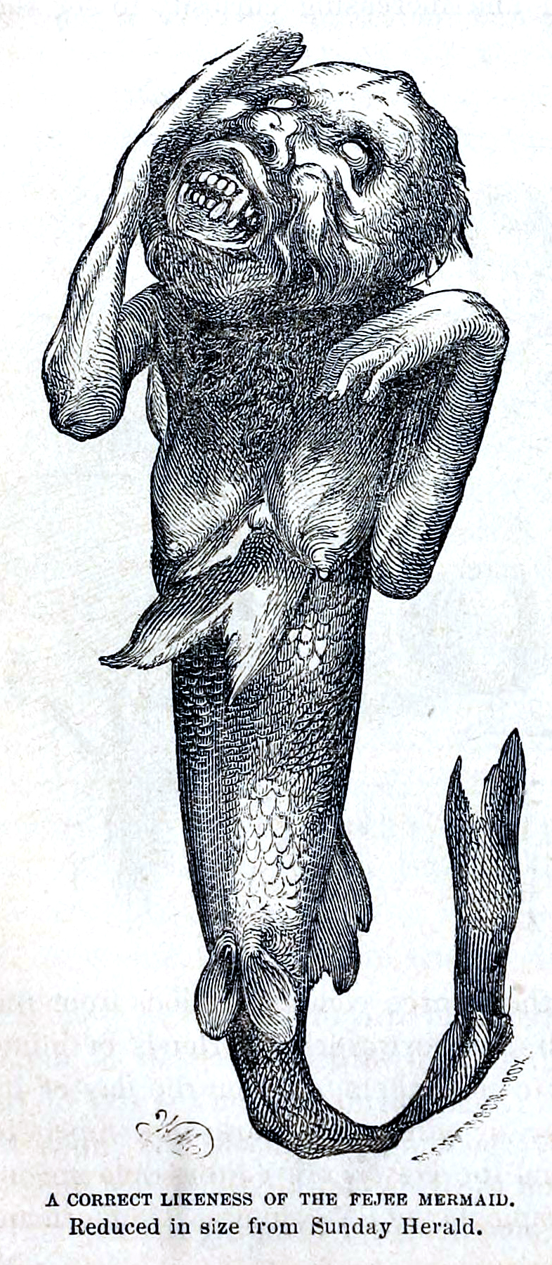 Meerjungfrau